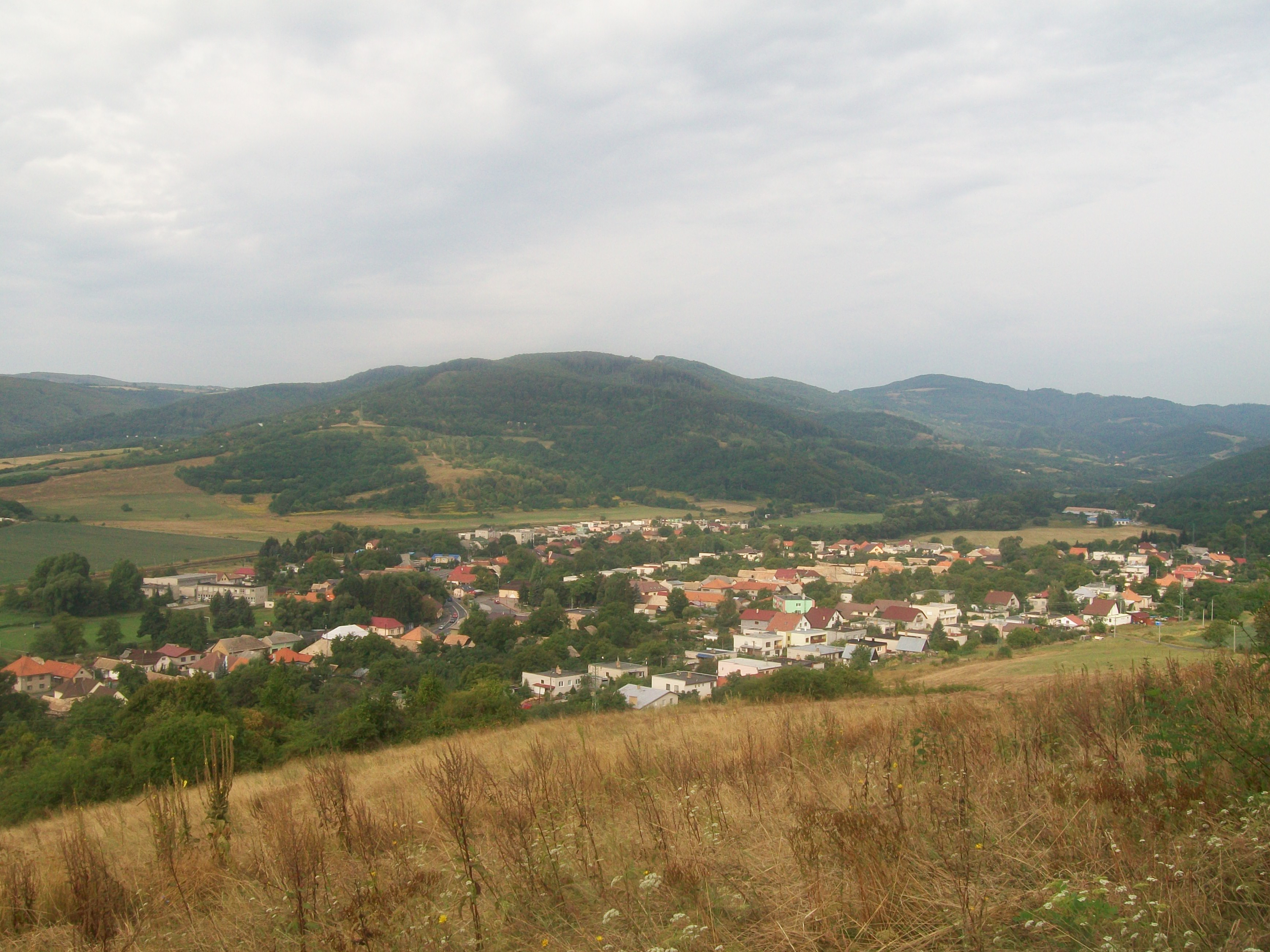 Pohľad na obec Mýtnu